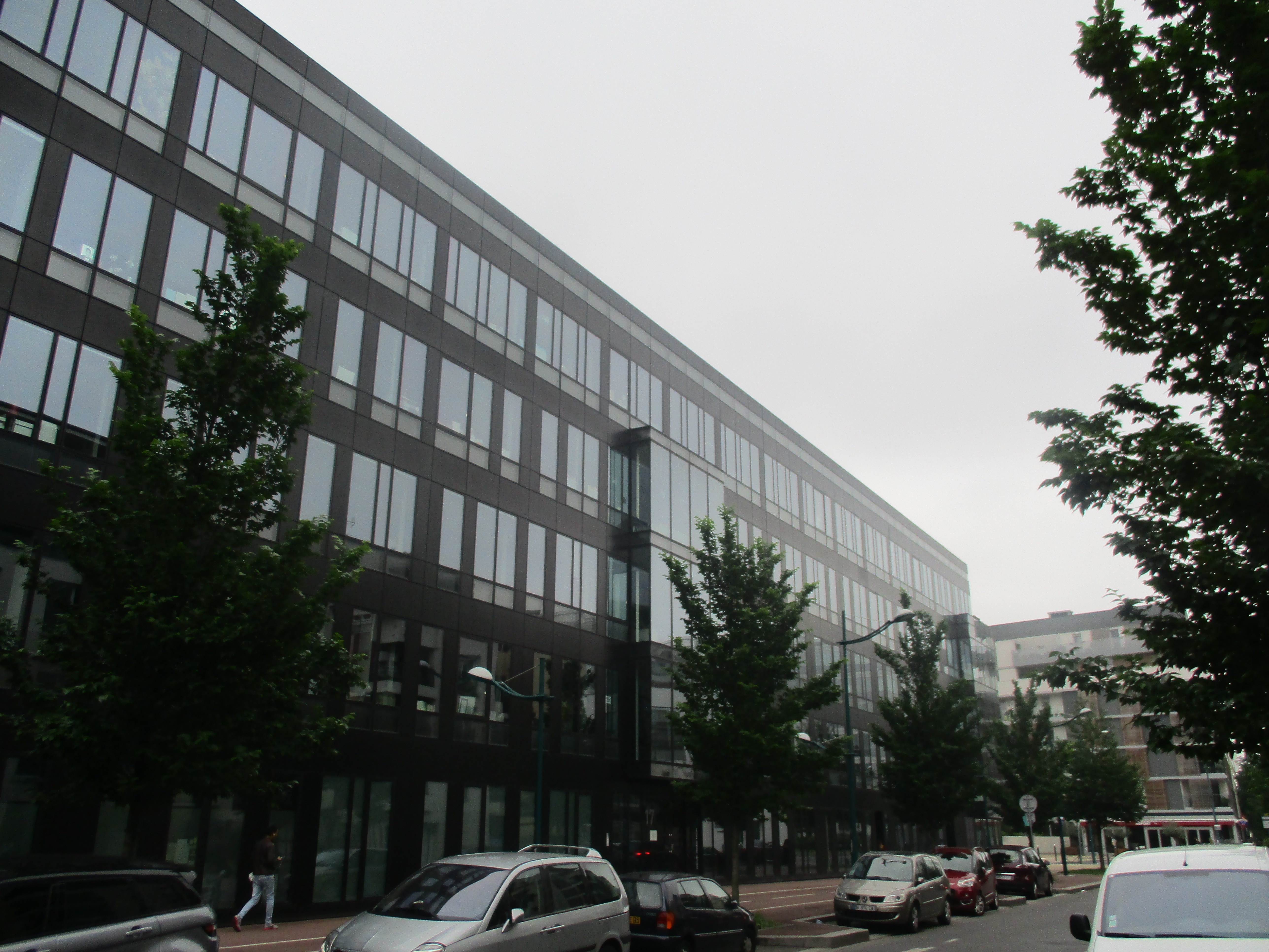 Siège de Prisma Media à Gennevilliers, rue Henri Barbusse.